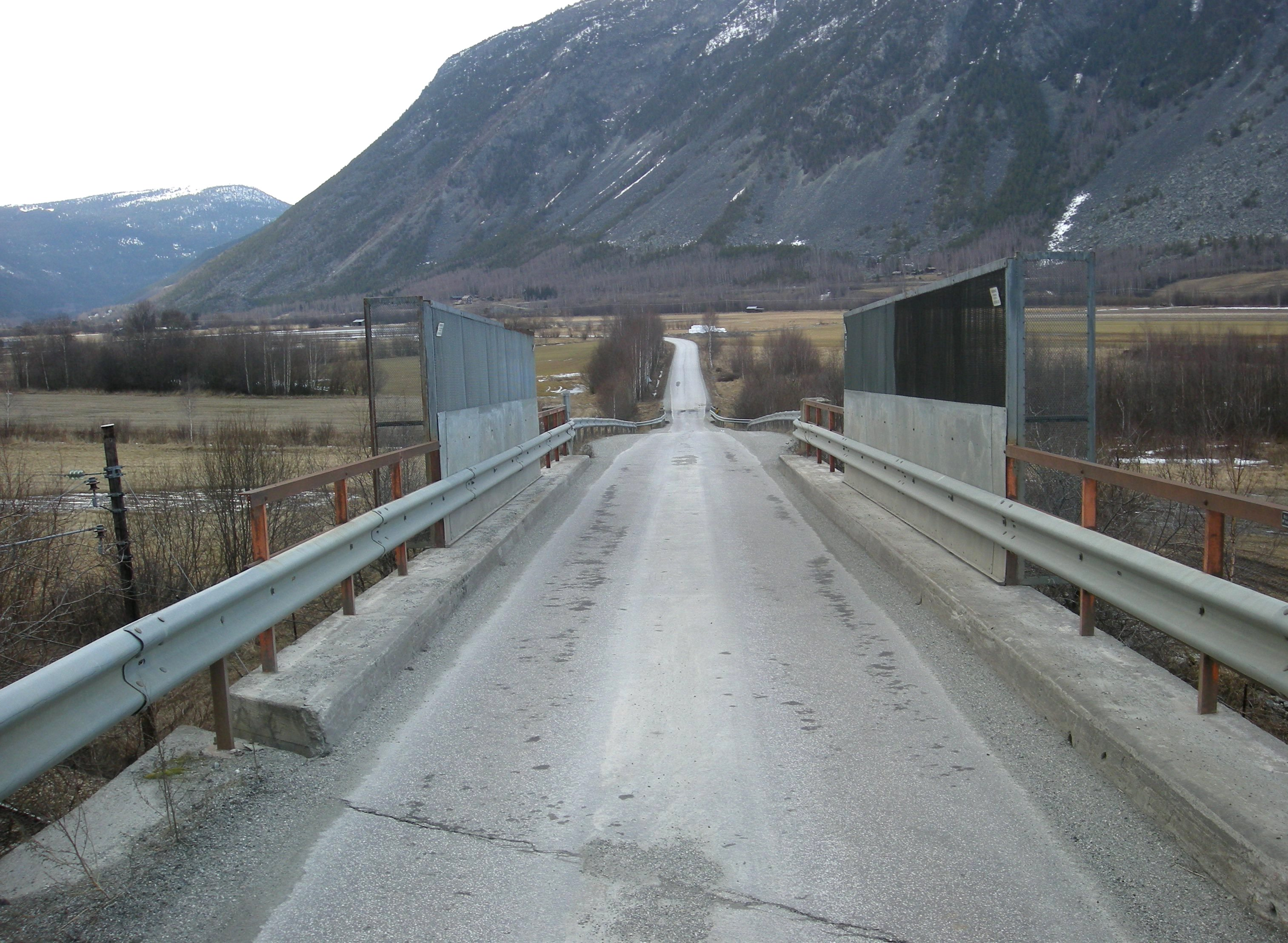 Skotte bro med fylkesvei 435 over Dovrebanen mellom Nord-Sel og Selsverket